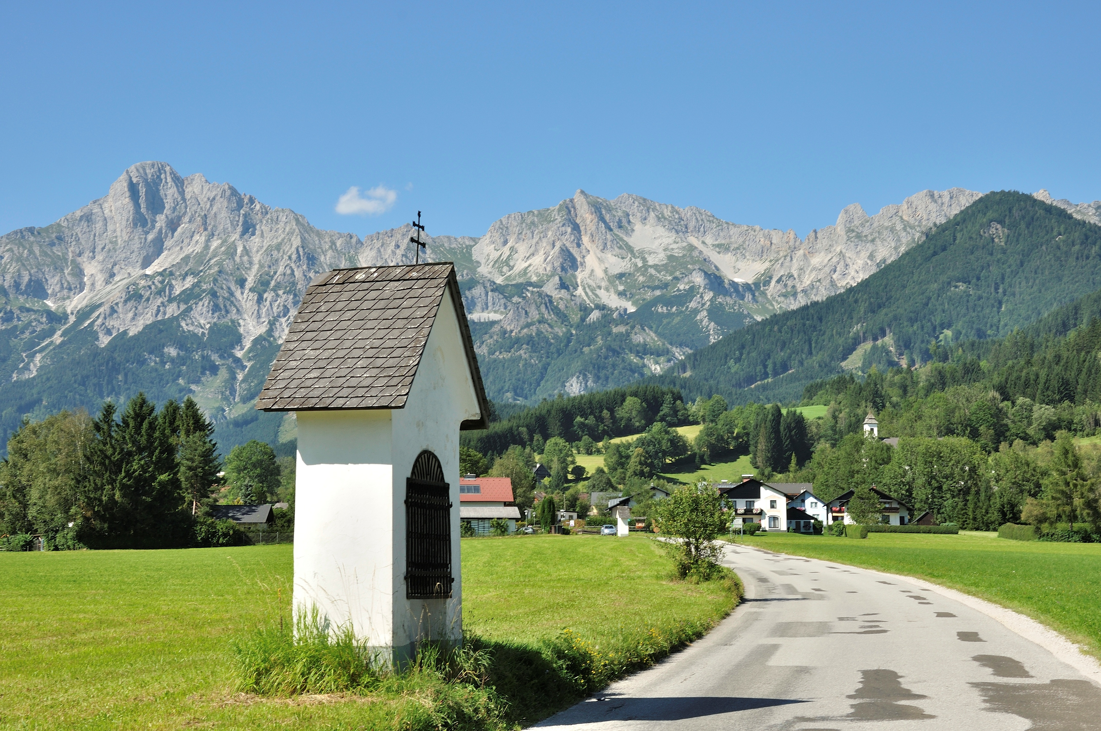 Drei Bildstöcke Passion Christi. Der mittlere von drei Bildstöcken mit Darstellungen der Passion Christi an der Straße von Admont nach Hall bei Admont. Am Ende der Straße kann man noch den dritten Bildstock, der auch zu diesem Denkmal gehört, erkennen.